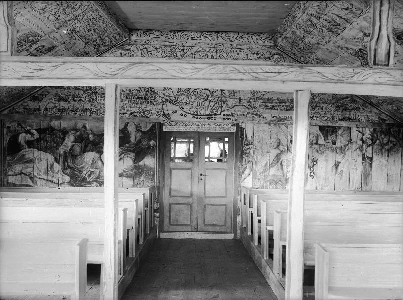 Interiör mot väster. Efter restaurering. Kategori: (02) InteriörerInteriör mot väster. Efter restaurering.